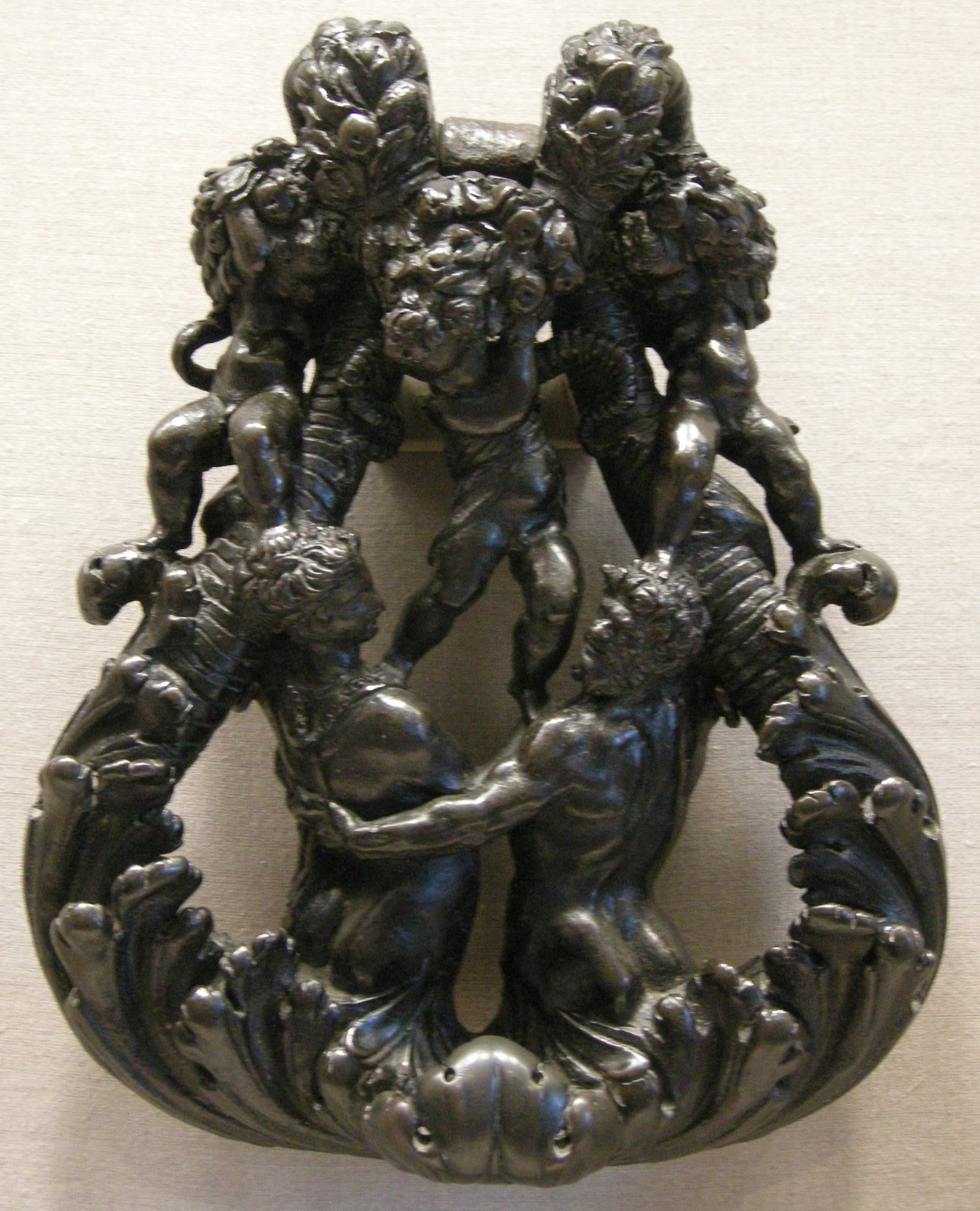 Jacopo sansovino, battente con nereide, tritone e putti, 1550 circa